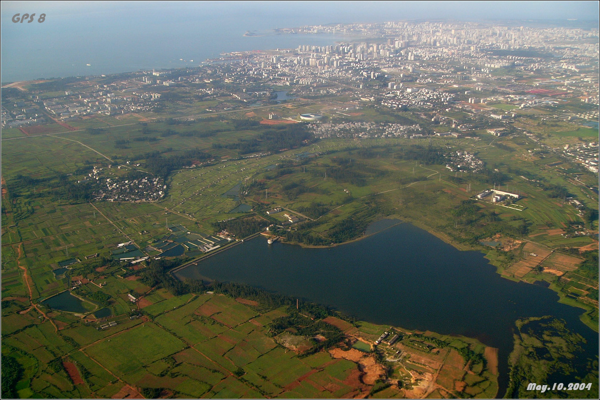 航拍海口永庄水库2004